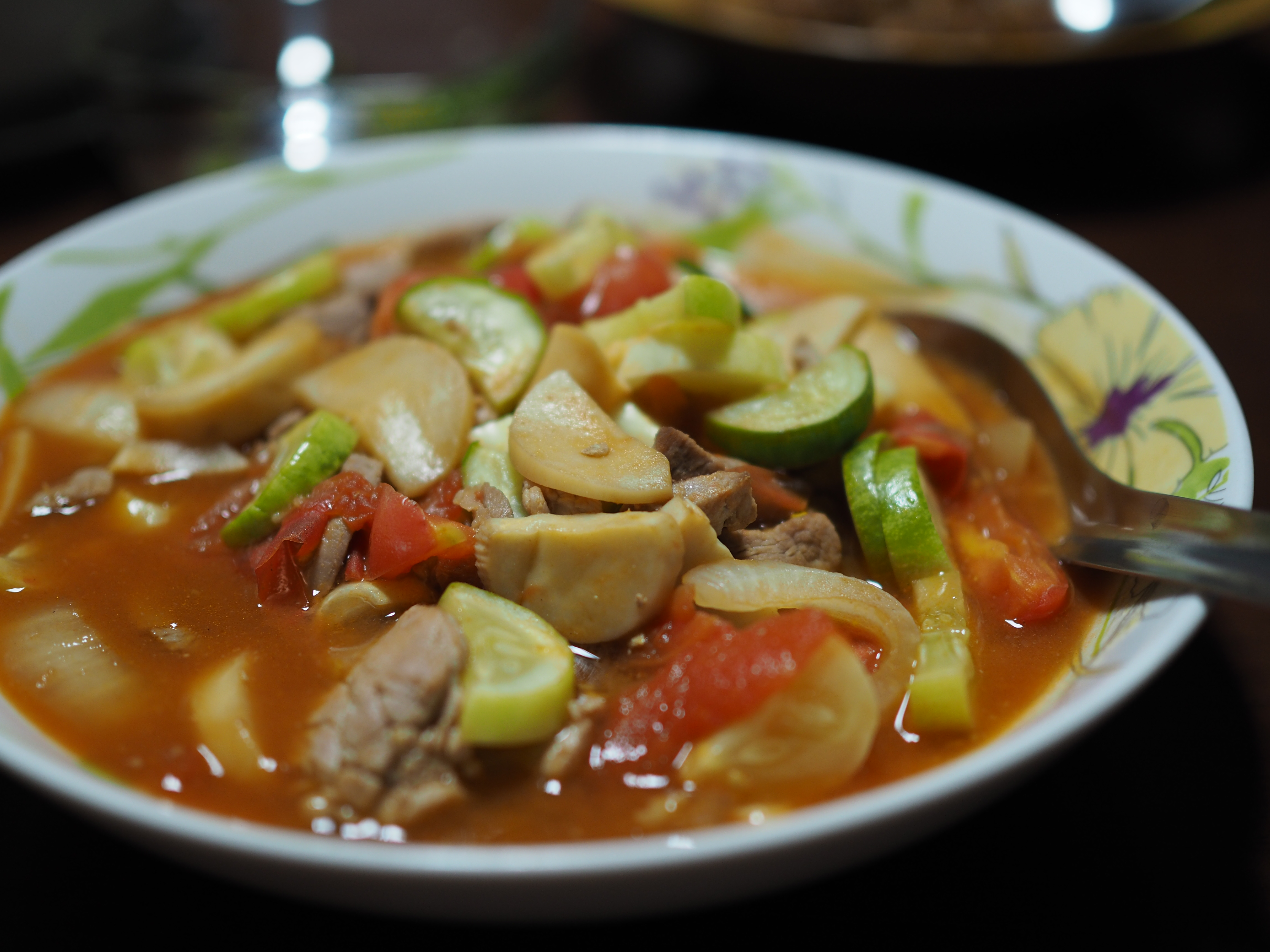 ผัดเปรี้ยวหวาน